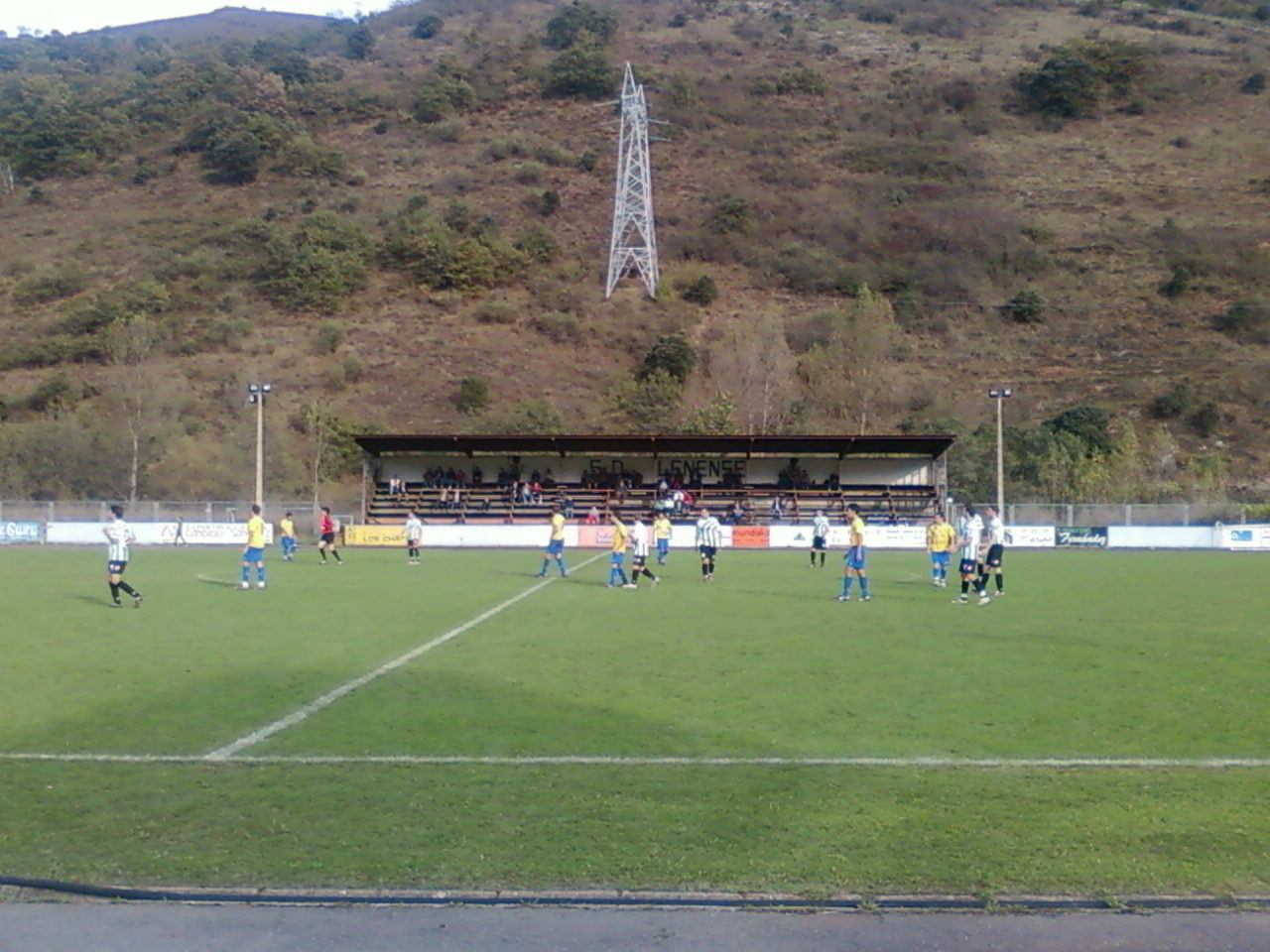 Tribuna "Caja de Ahorros"